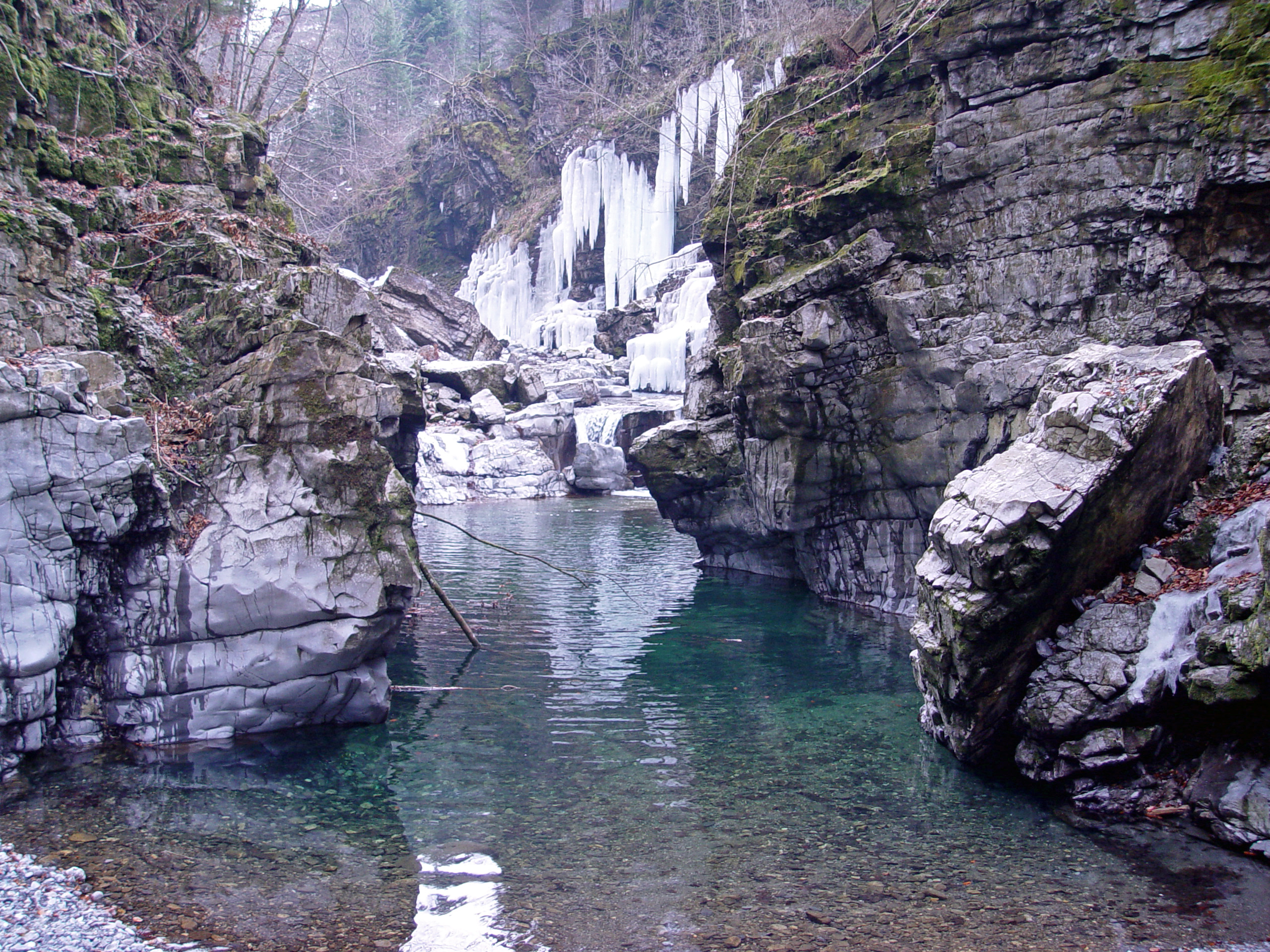 Fluss Muota in der engen Schlucht ca. drei Kilometer südöstlich von Ibach SZ.